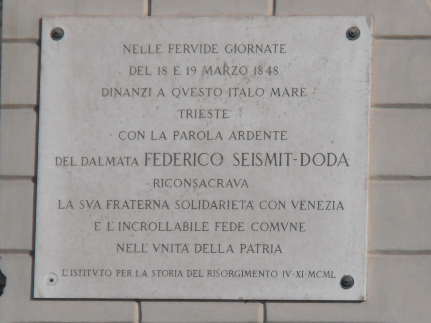 Italy - Trieste - Targa a Federico Seismit-Doda